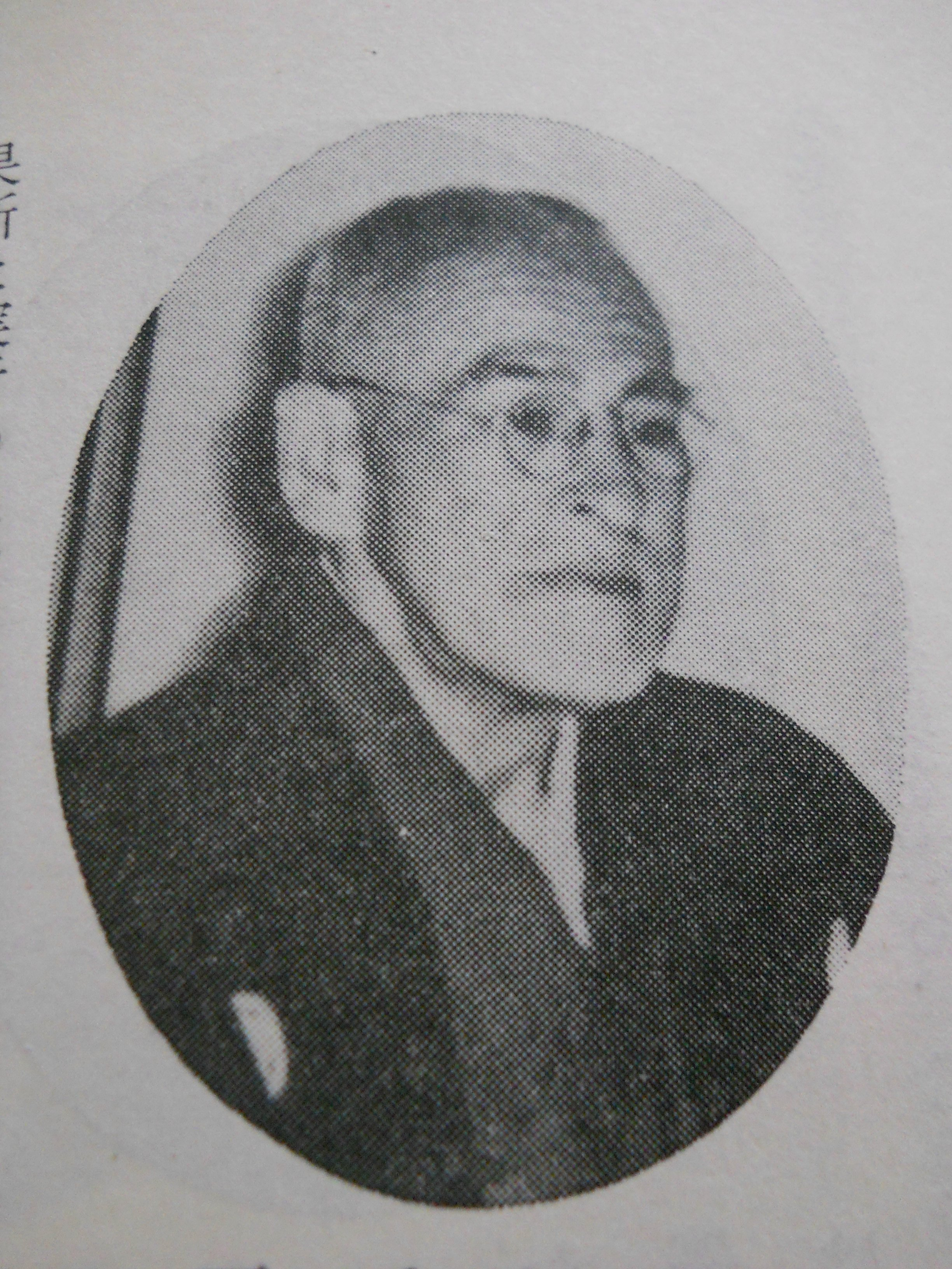 Shouzi Ren1